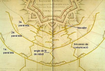 Tècnica d'atac de bastions pel mètode Vauban de trinxeres paral·leles